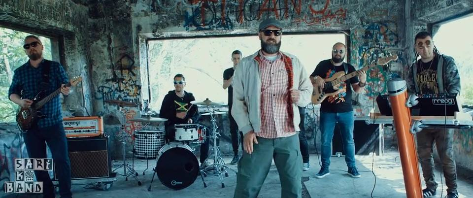 montaż klipu